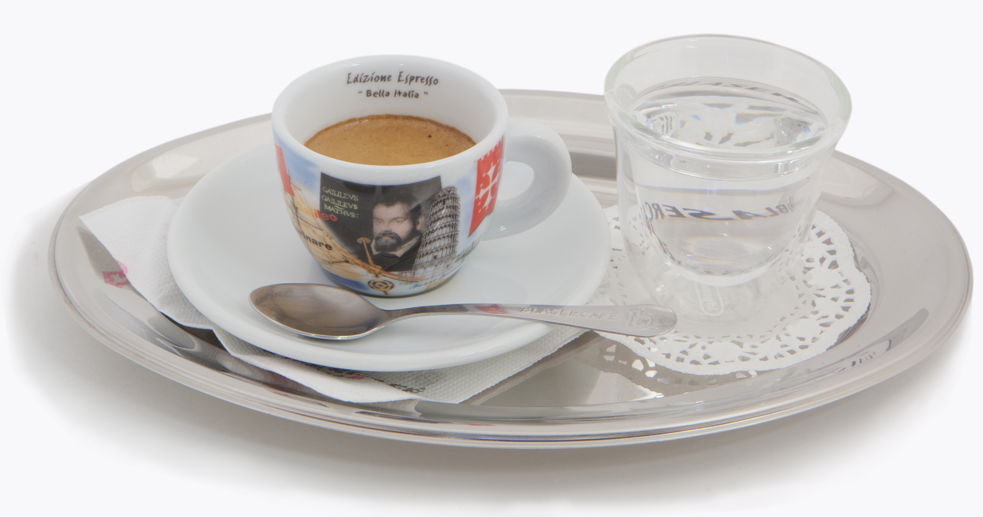 Еспресо. Сервіровано в шоу-румі "КофеМаркет", Київ. Власне фото.